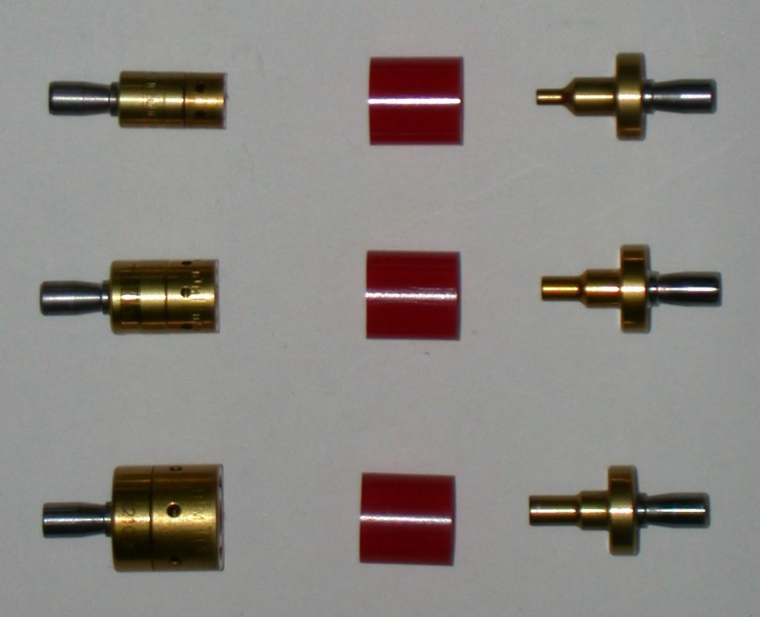 Durchsetzfügen: Clinch-Stempel und -Matrizen